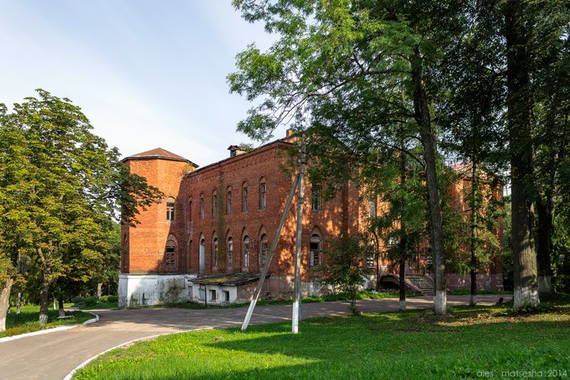 Юрцава. Былая сядзіба